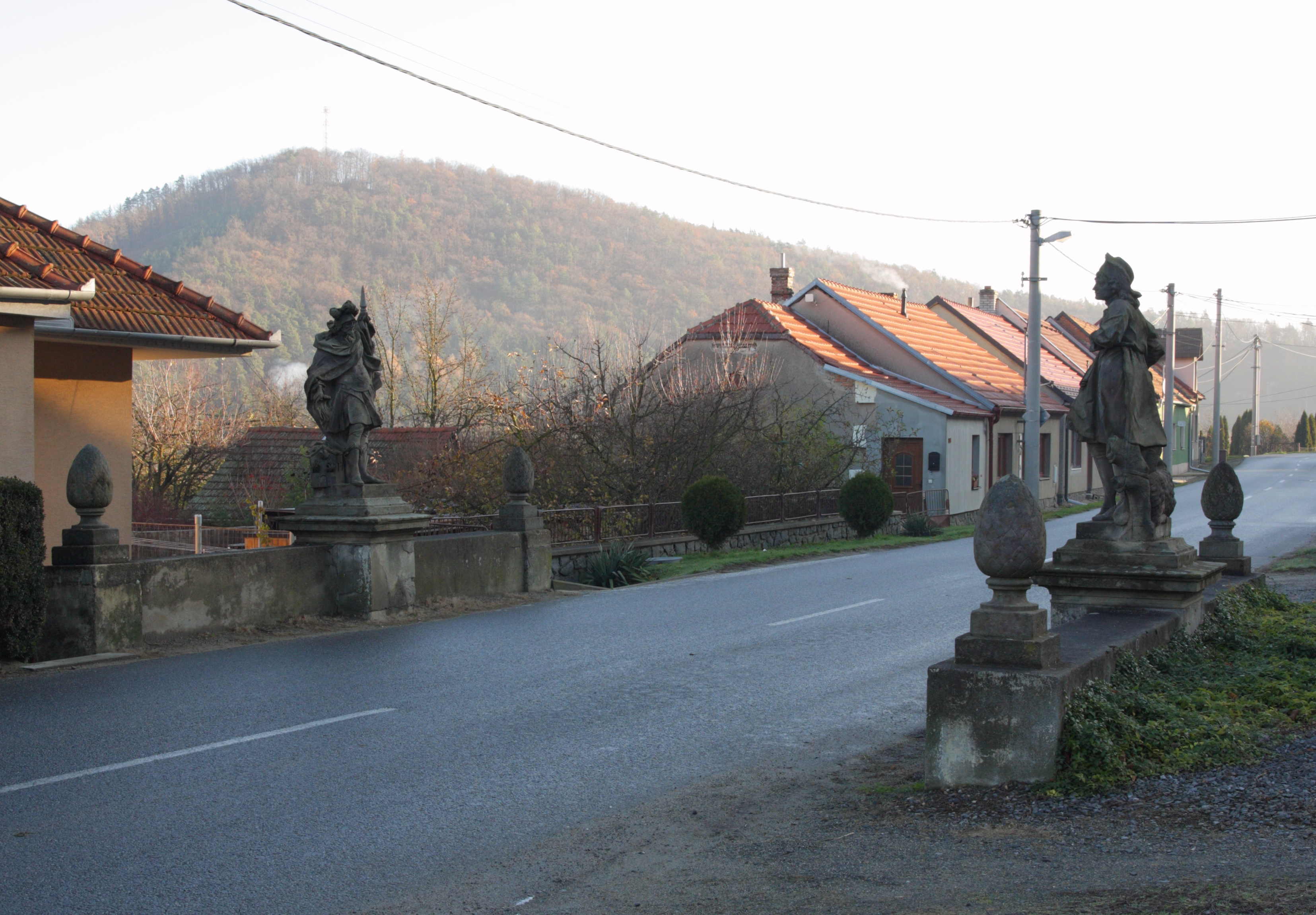 Račice (Račice-Pístovice) - most se sochami sv. Floriána a Vendelína